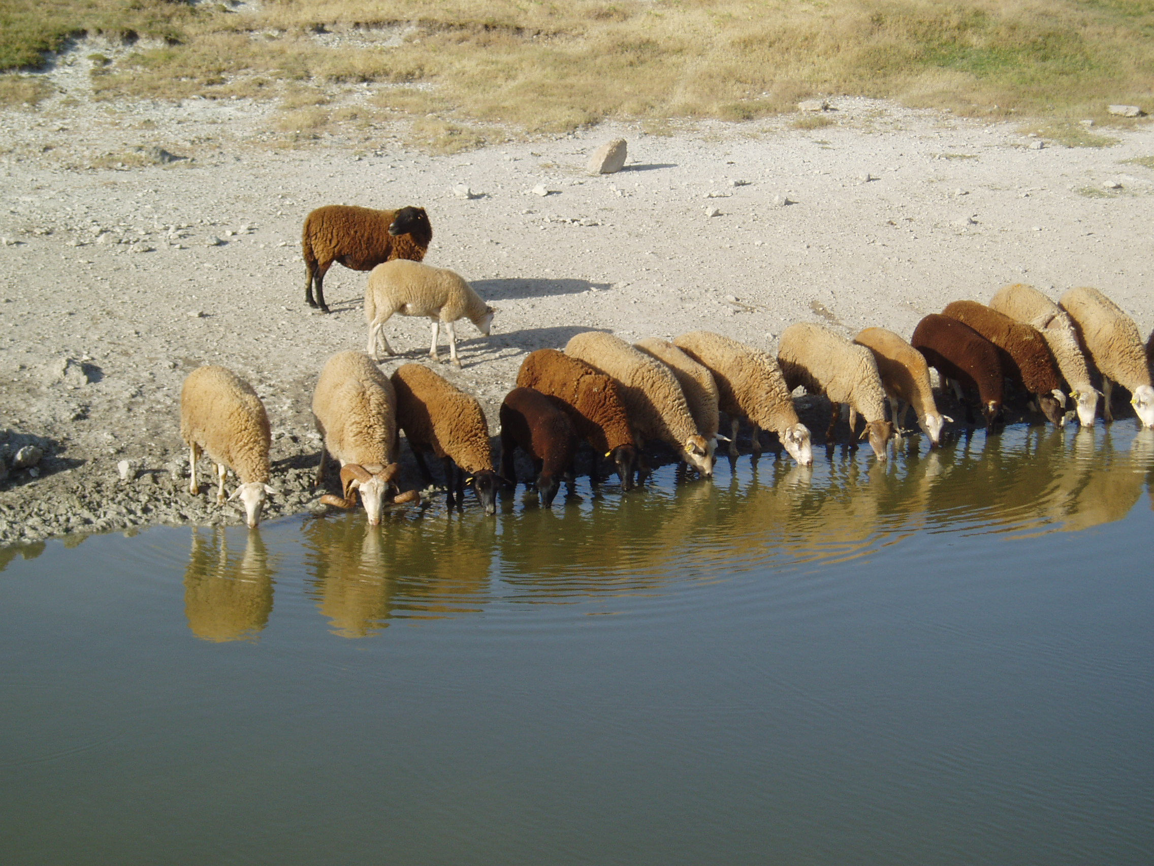 Ovejas lojeñas abrevando en el Charco del Negro, a 1.400 m de altitud en la Sierra de Loja, provincia de Granada, perteneciente al Complejo de las Lagunas de la Sierra de Loja y Zafarraya.